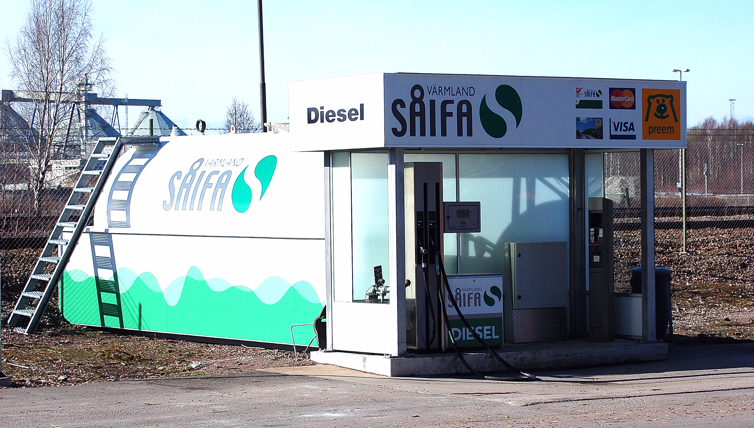 SÅIFAs bränsledepå i Skoghall